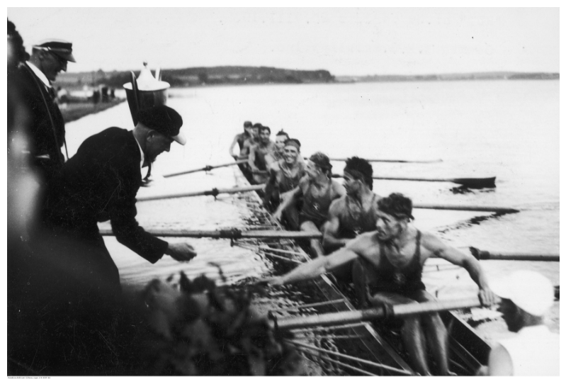 Śmigły Wilno - Mistrzowie Polski 1939 ósemka. Zawadzki Wł., Karwecki B., Kiedel M., Zajączkowski J., Trojanowski E., Juszczyński M., Falkowski J. Kieliszczyk W., ster. Wirszyłło